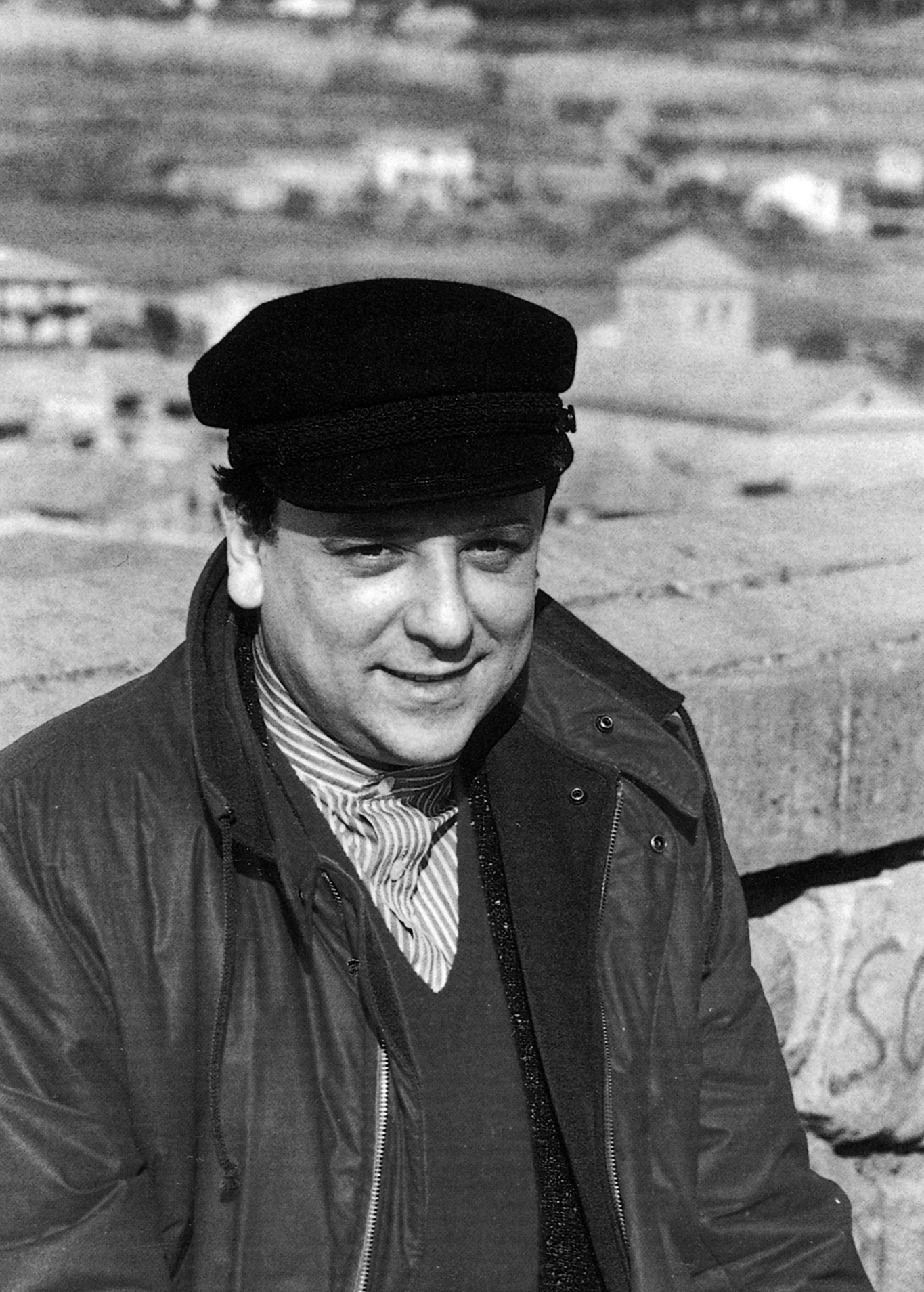 Enrique Trullenque fotografiado por su amigo el pintor Joaquín Escuder. Aproximadamente en 1989.